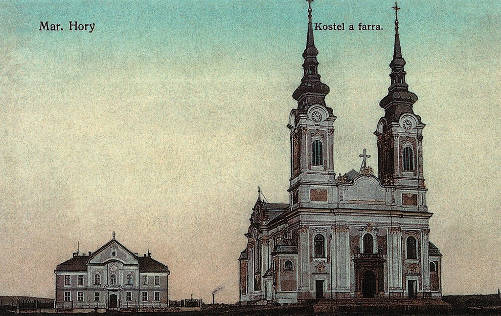 Dobová pohlednice z Mariánských Hor zachycující kostel a faru.